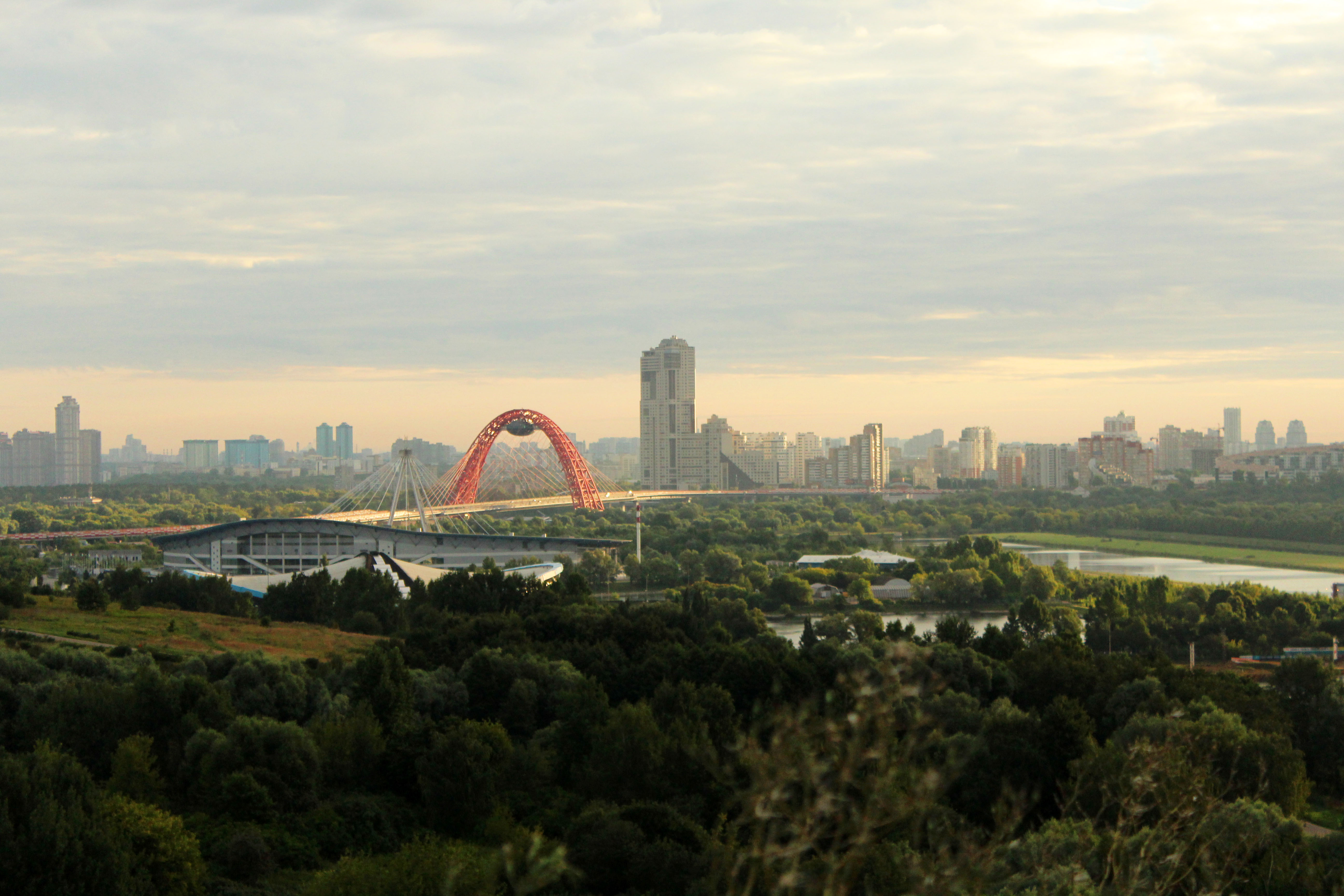 Заказник 'Крылатские холмы': Западный округ, Москва This image is related to the protected area of Russia number 7710408